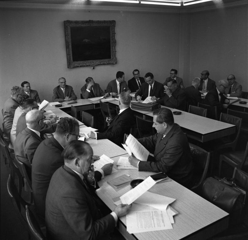 Sitzung: "Ausschuß für Lastenausgleich" im Bundeshaus Bonn